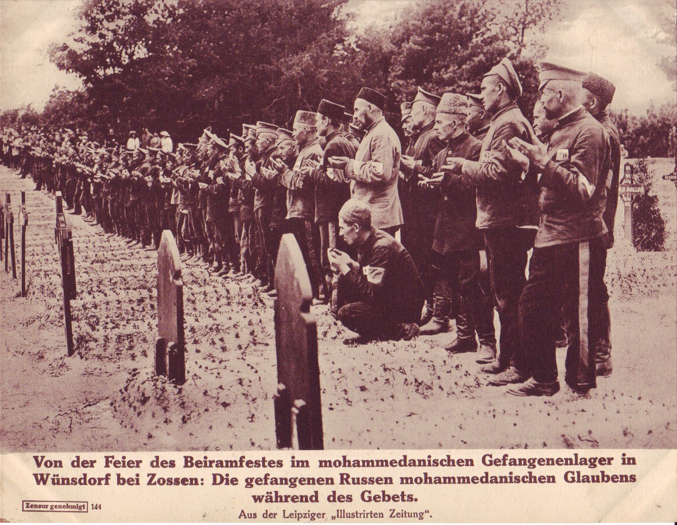 Postkarte